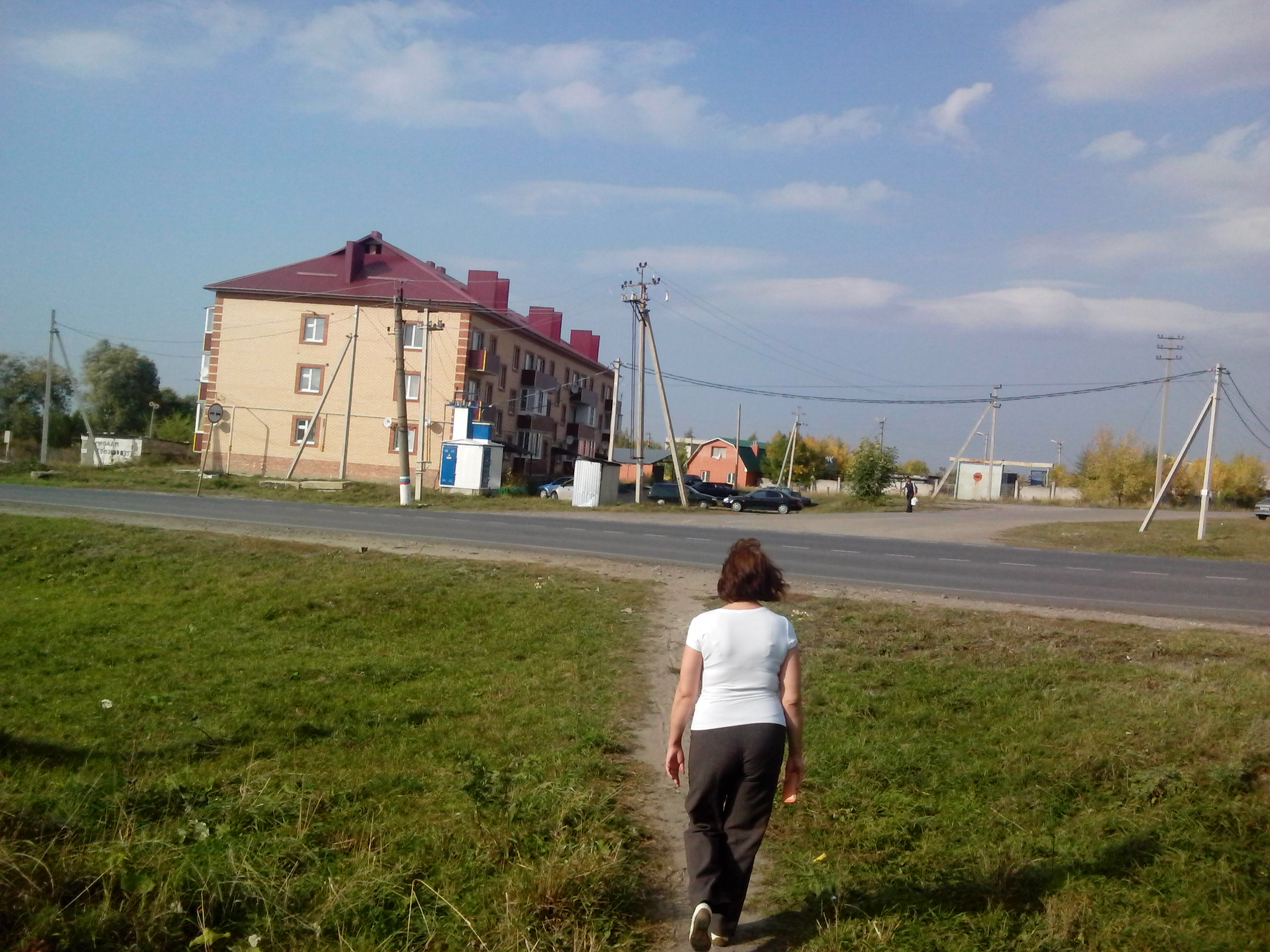 Новый жилой дом на пересечении Новокомбинатовской ул. и улицы Текстильщиков. Ишеевка